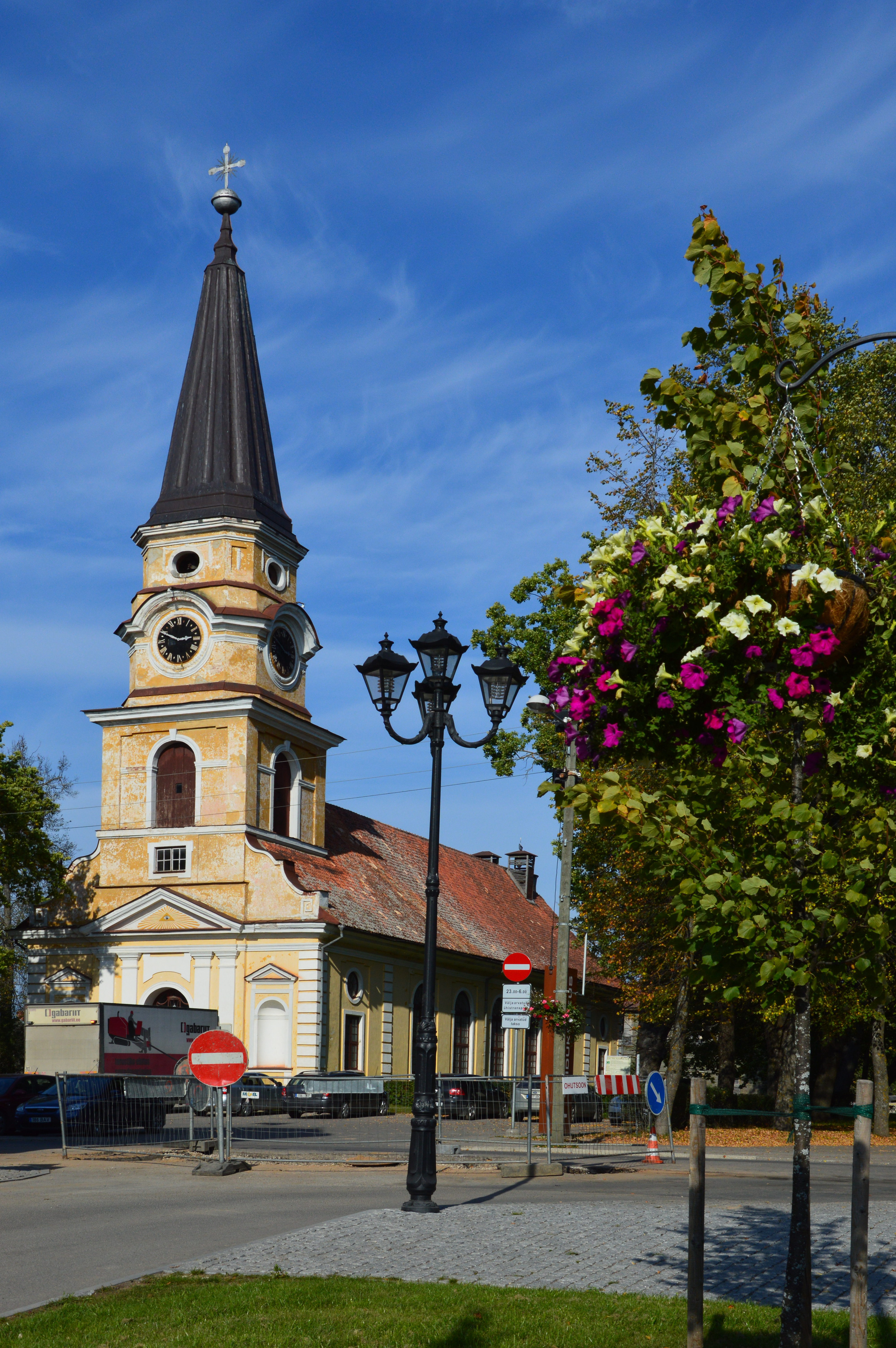 Võru Katariina kirik